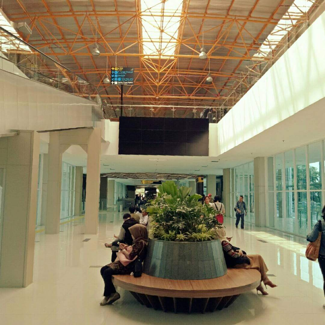 La gare Sudirman Baru du KRL Commuter Line de Jakarta